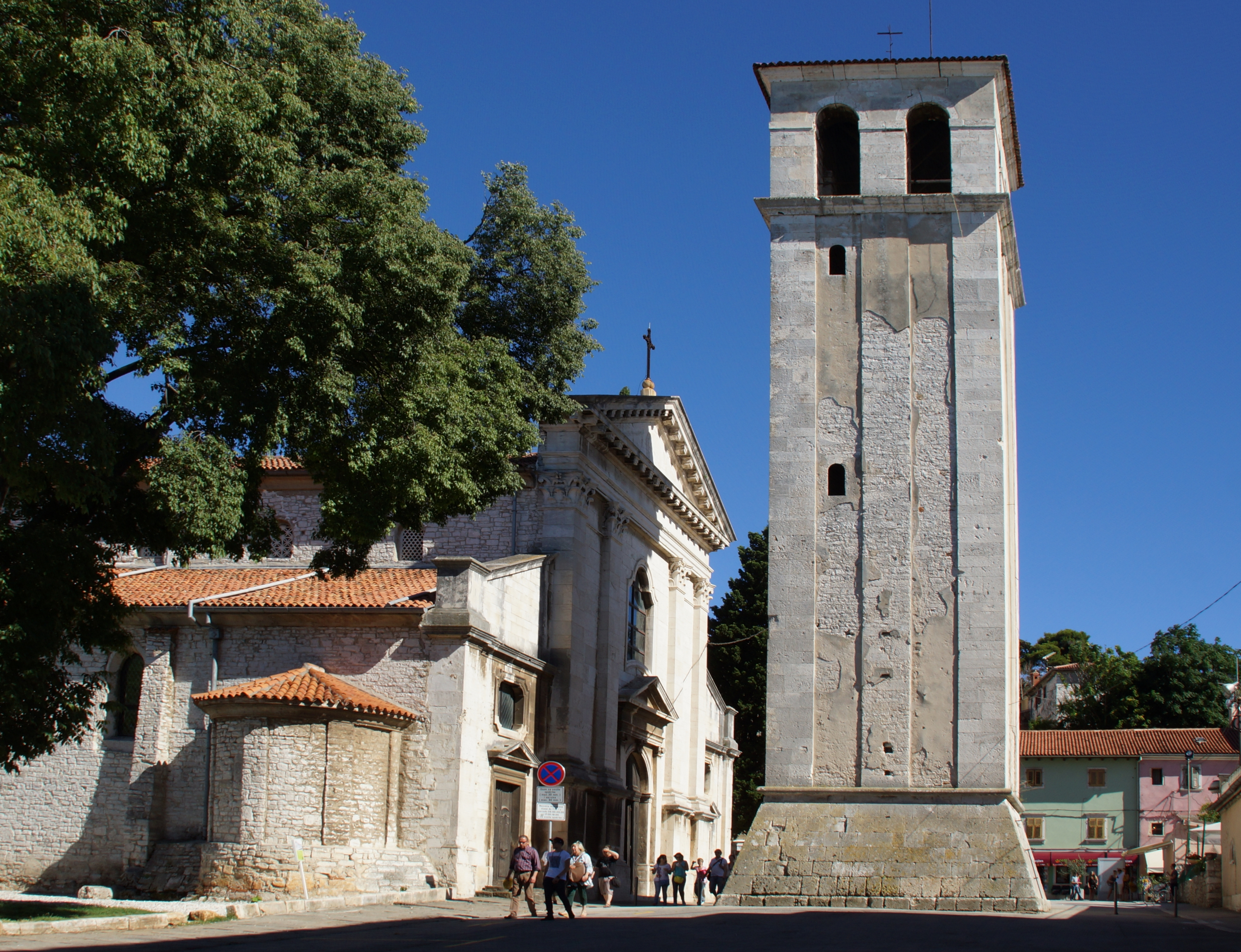 Die Kathedrale Mariä Himmelfahrt (Katedrala Uznesenja Blažene Djevice Marije) in Pula geht auf 6.Jahrhundert zurück, heutiges Aussehen auf das 16. bzw. 17. Jahrhundert (Turm) Foto Wolfgang Pehlemann DSC07785